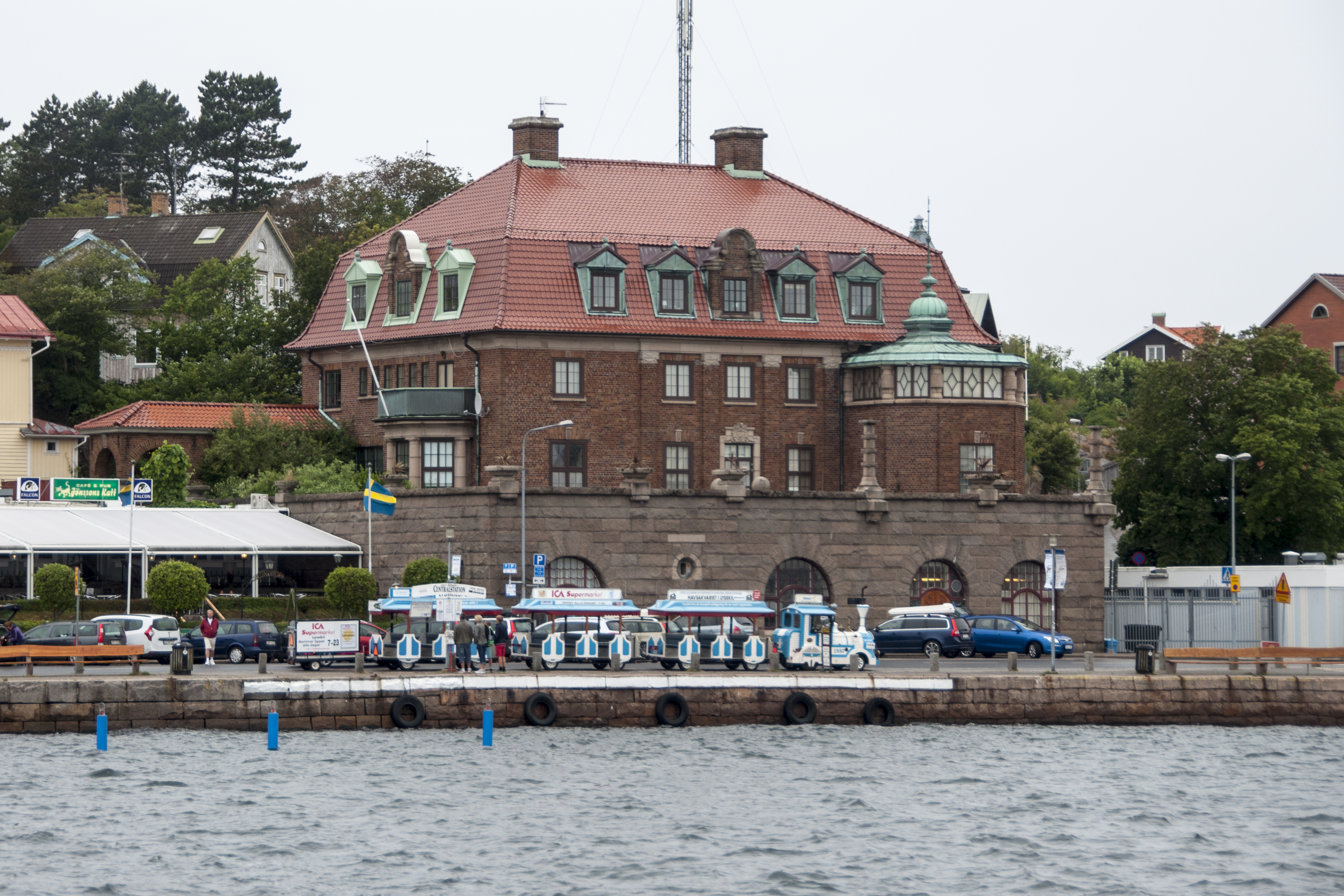 Laurinska villan i Lysekil. Uppförd 1919 år fabrikör Lars Laurin. Arkitekt Carl Hjalmar Zetterström. Sedan 1932 redaktionshus för Lysekilsposten.